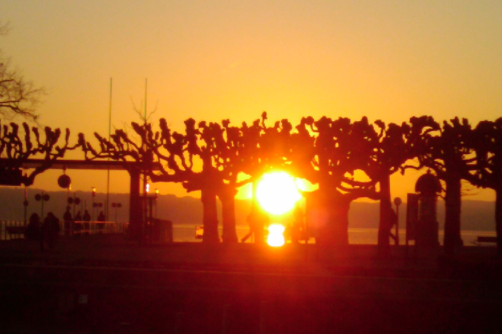 Rapperswil SG Seequai Quai-Allee Sonnen-Untergang 2012-03-15